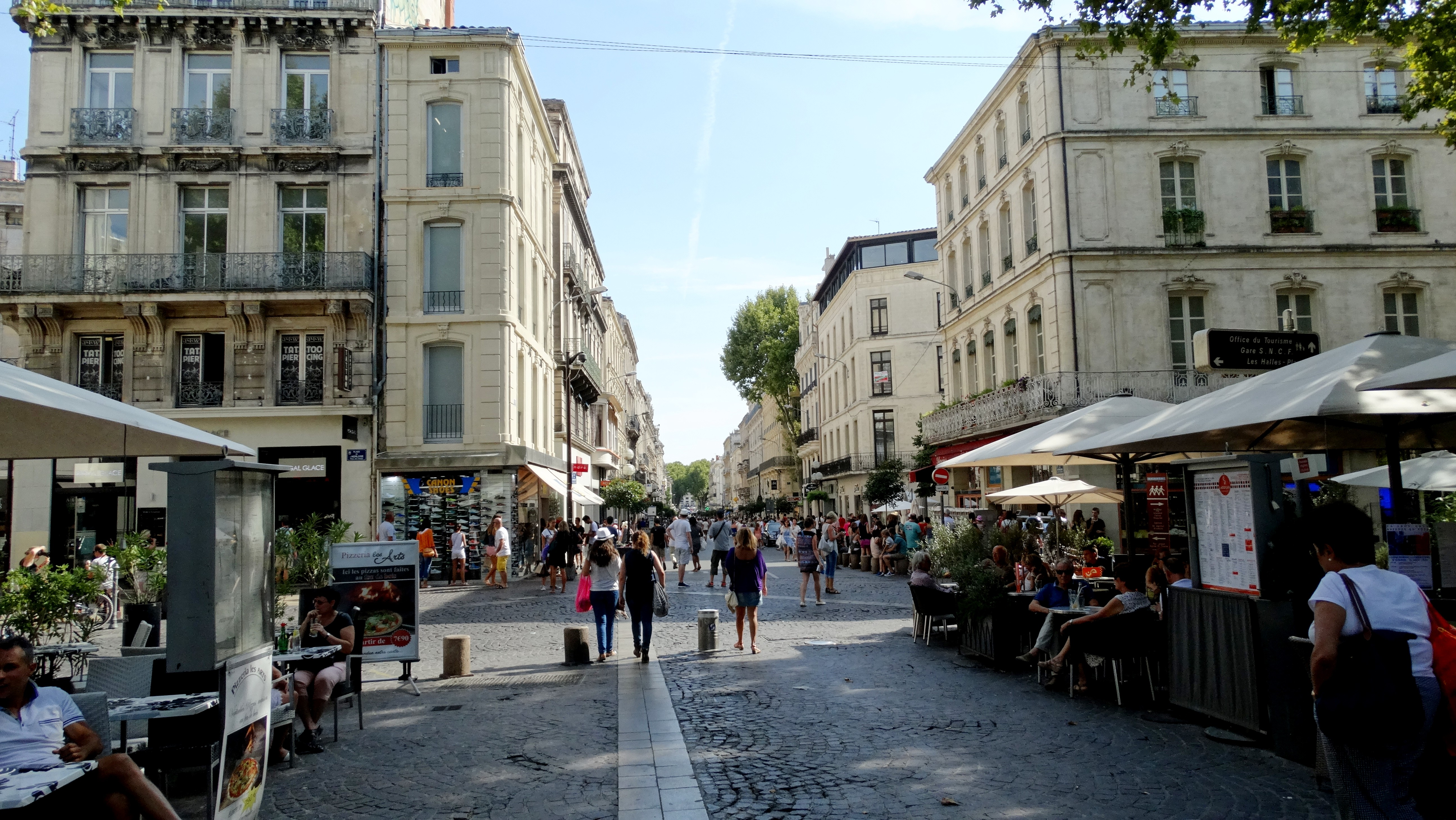 France - Avignon - rue de la République, depuis la place de l'horloge